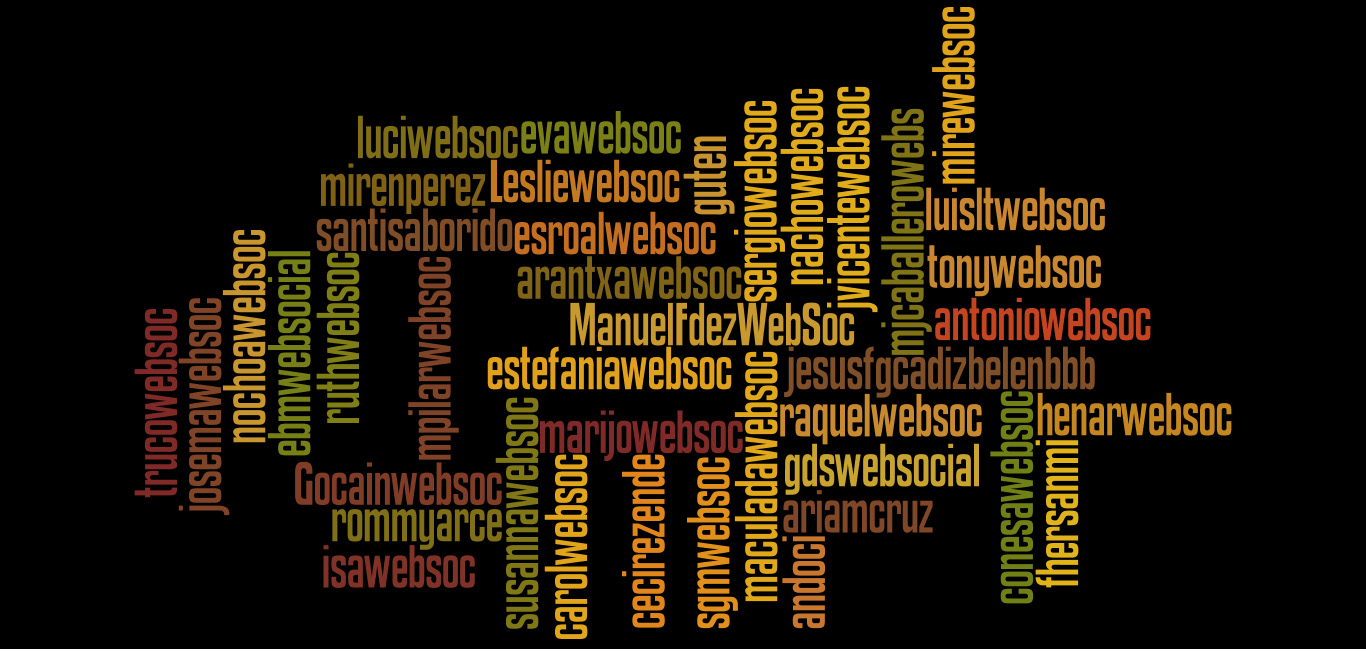 Se trata de una nube creada con las identidades de los miembros de la asignatura Web Social del Máster de Bibliotecas y Servicios de Información Digital de la Carlos III de Madrid.